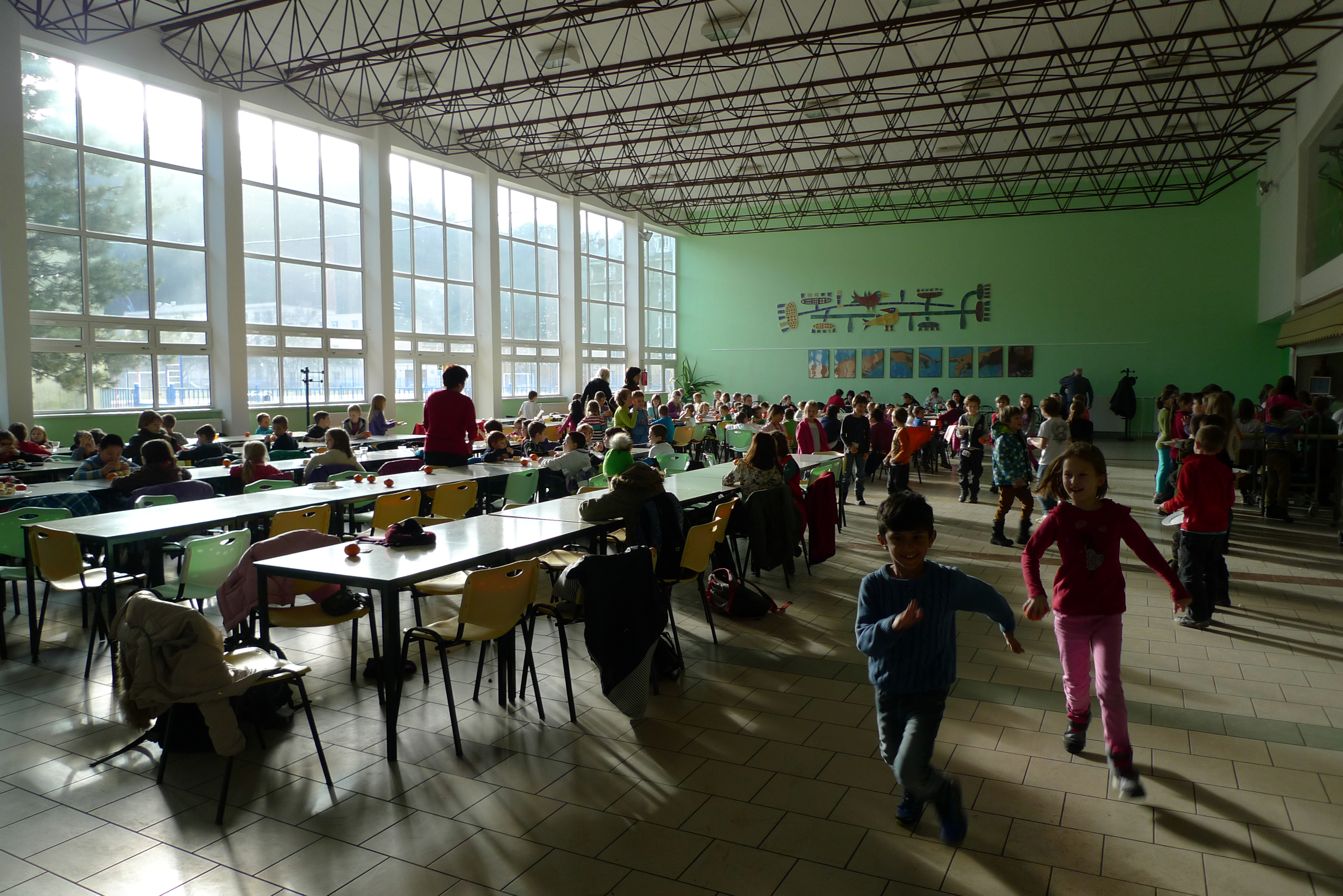 Školní jídelna Základní školy Petra Strozziho v Praze 8-Karlíně.